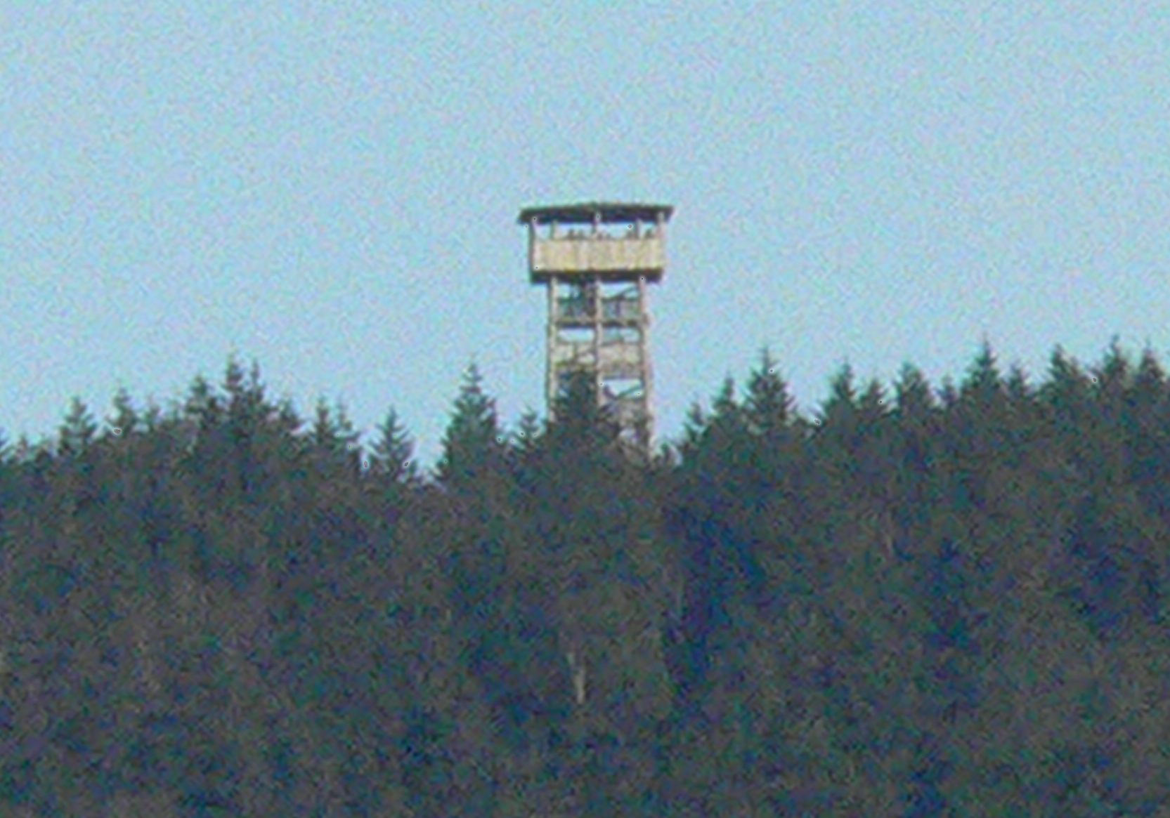 Kellerwald (Hessen), Aussichtsturm auf dem "Wüstegarten" - Nationalpark Kellerwald-Edersee.